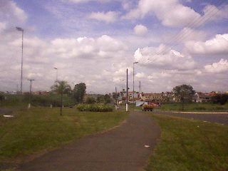 Vista da ciclovia na avenida João Aranha, em Paulínia.